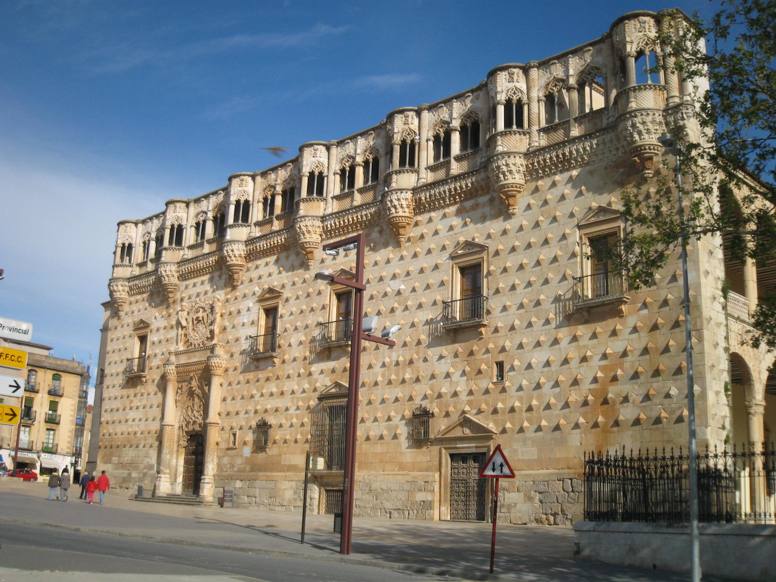 Palacio del Infantado in Guadalajara (Spain).